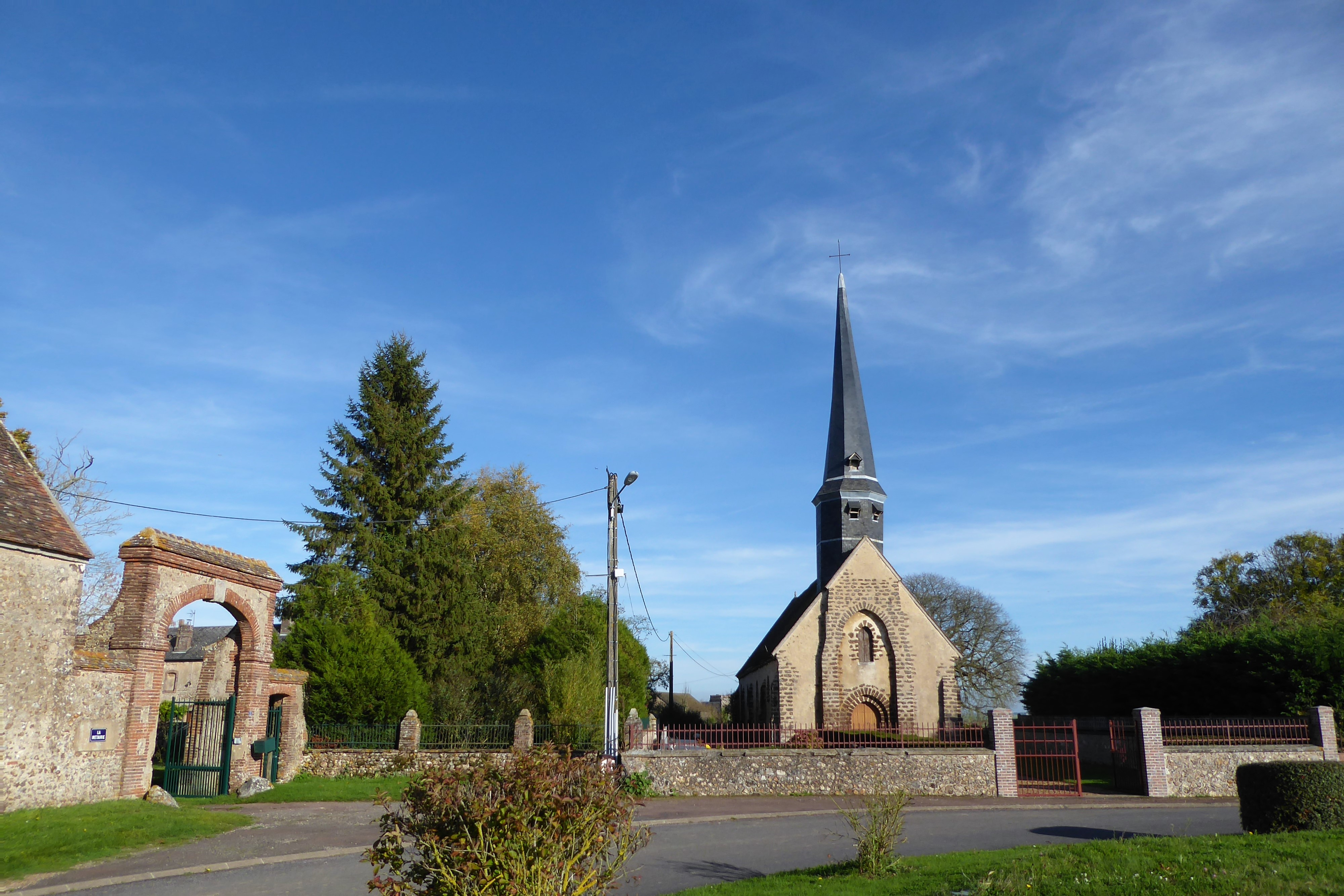 église Saint-Pierre, Bullou, Eure-et-Loir, France.